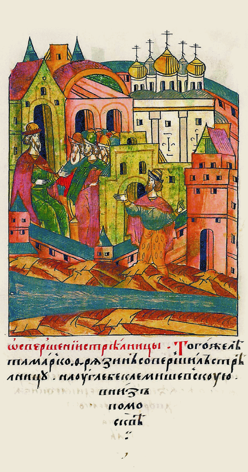 О постройке стрель- ницы. В том же году Марк Фрязин постро- ил на углу Беклеми- шевскую стрельницу вниз по Москве.